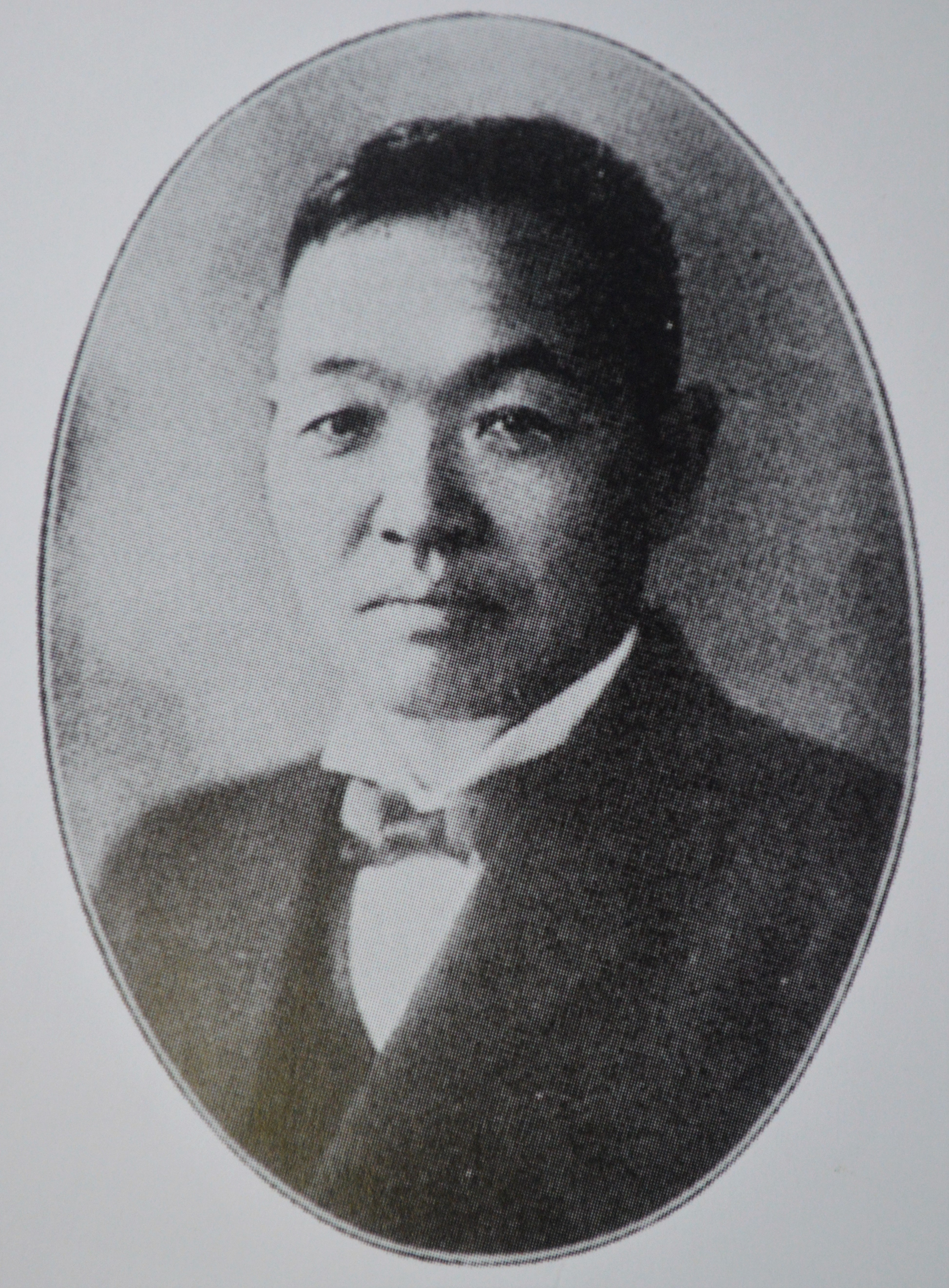 京都府中郡峰山町出身の吉村伊助 (4代目)。